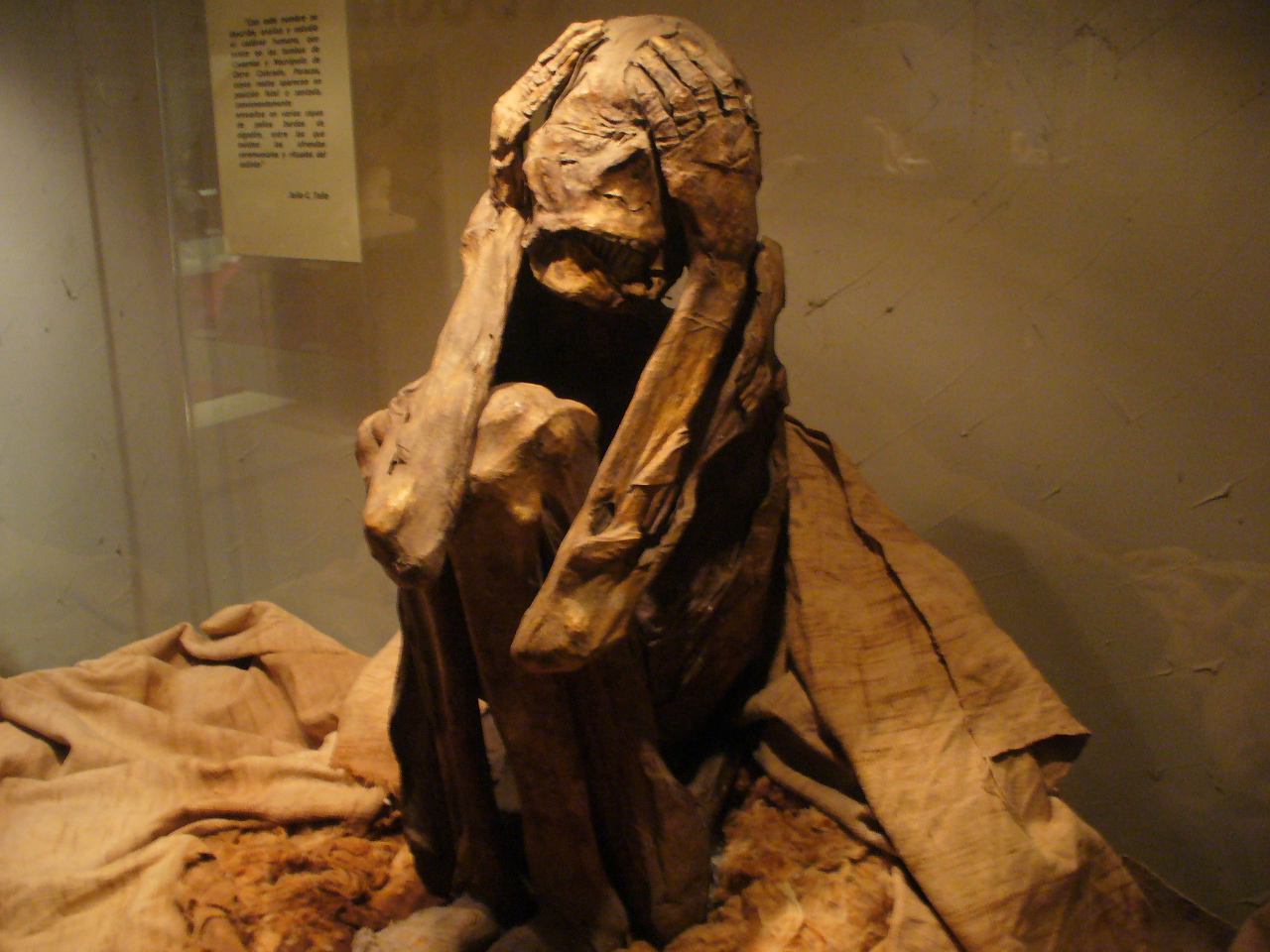 Os Wari (civilização antes dos Incas) quando morriam eram mumificados na posiçao fetal. Peça do museu antropológico.